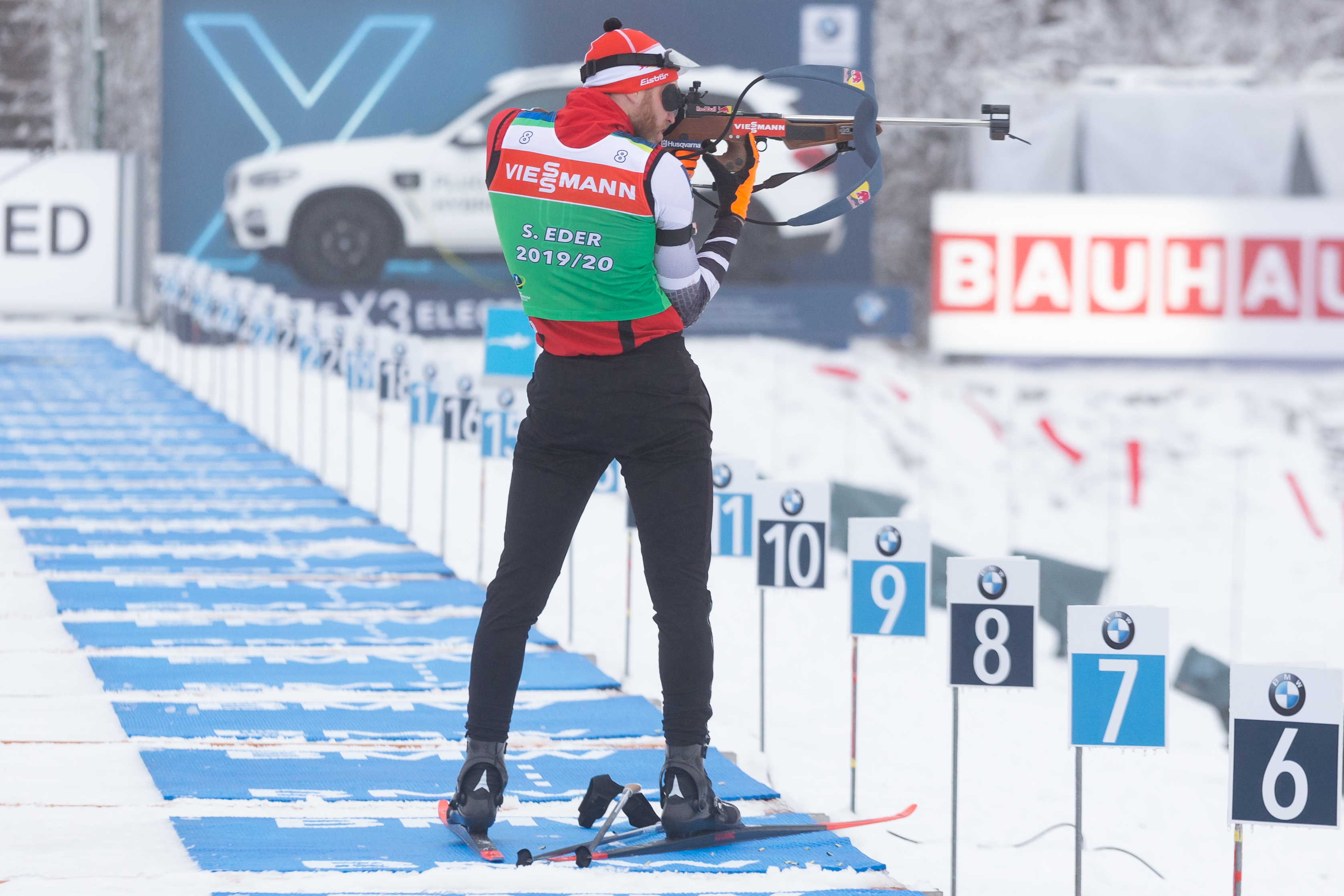 IBU World Cup Biathlon Oberhof; Simon Eder (AUT, Österreich) beim Stehendschießen